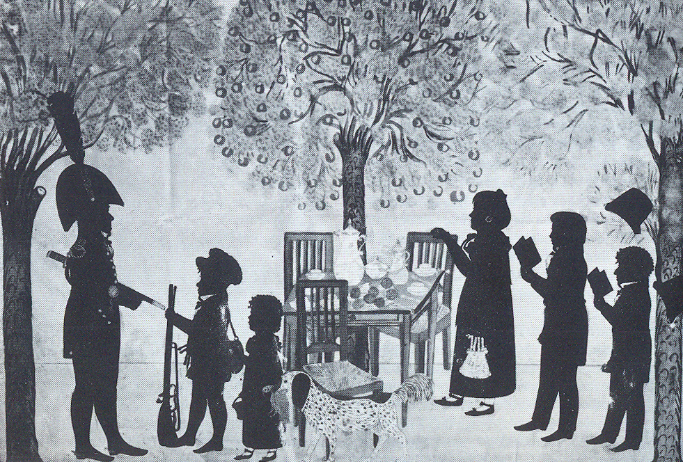 Scan eines Fotos eines um 1817 entstanden Scherenschnitts des Silhouetteurs Johann Caspar Dilly "Förster Püschelberger und Frau, geb. Möllmann, mit Kindern"